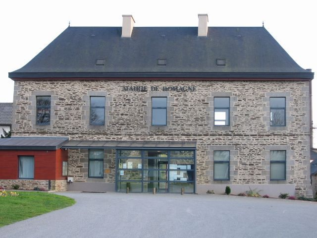 La mairie de Domagne.